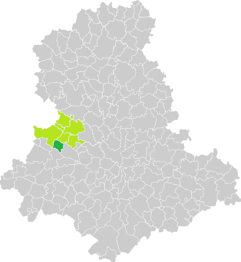 Carte de situation de la commune de Saint-Martin-de-Jussac (en vert foncé) dans le votre Canton (en vert clair) sur une carte des communes de la Haute-Vienne